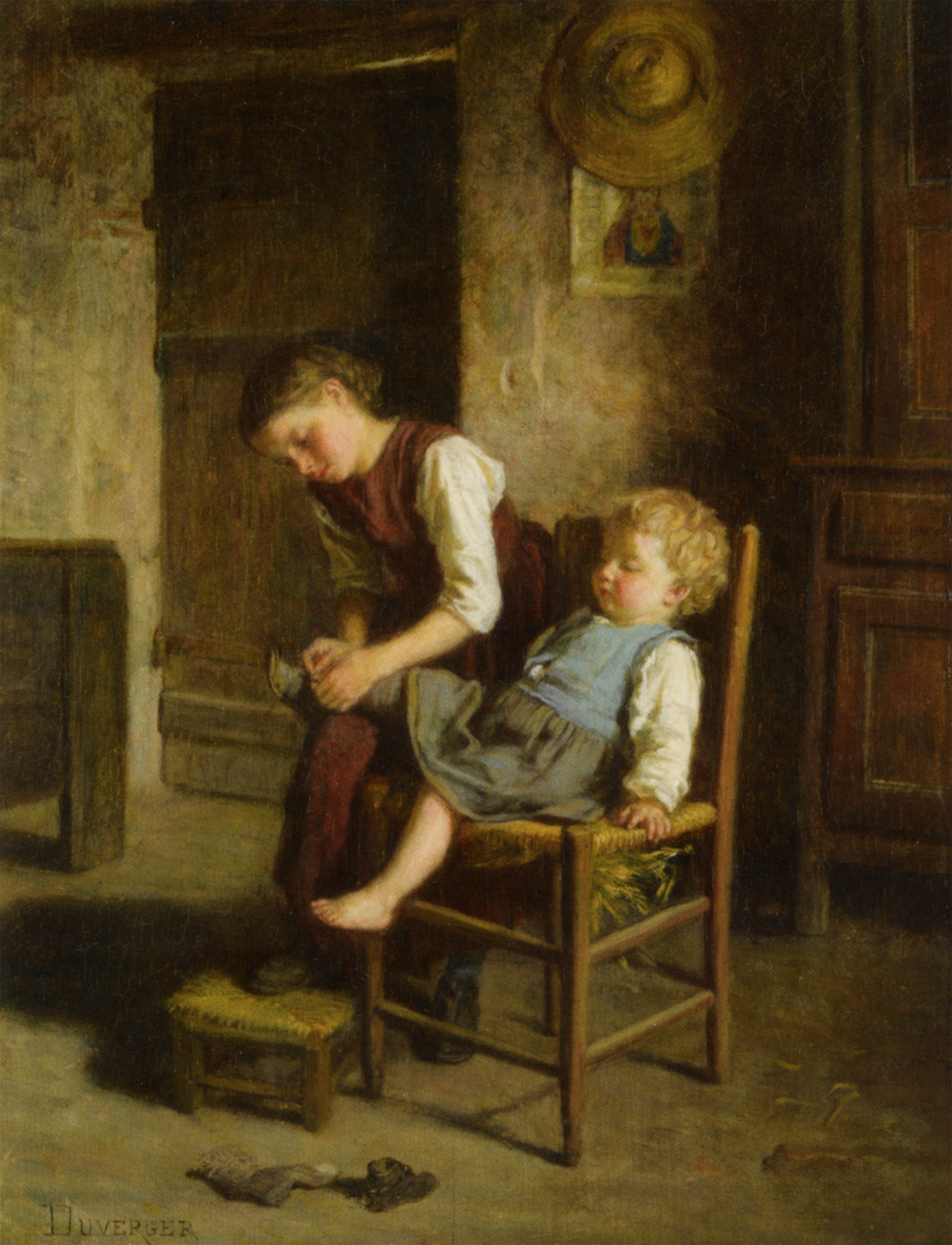 Soeurs